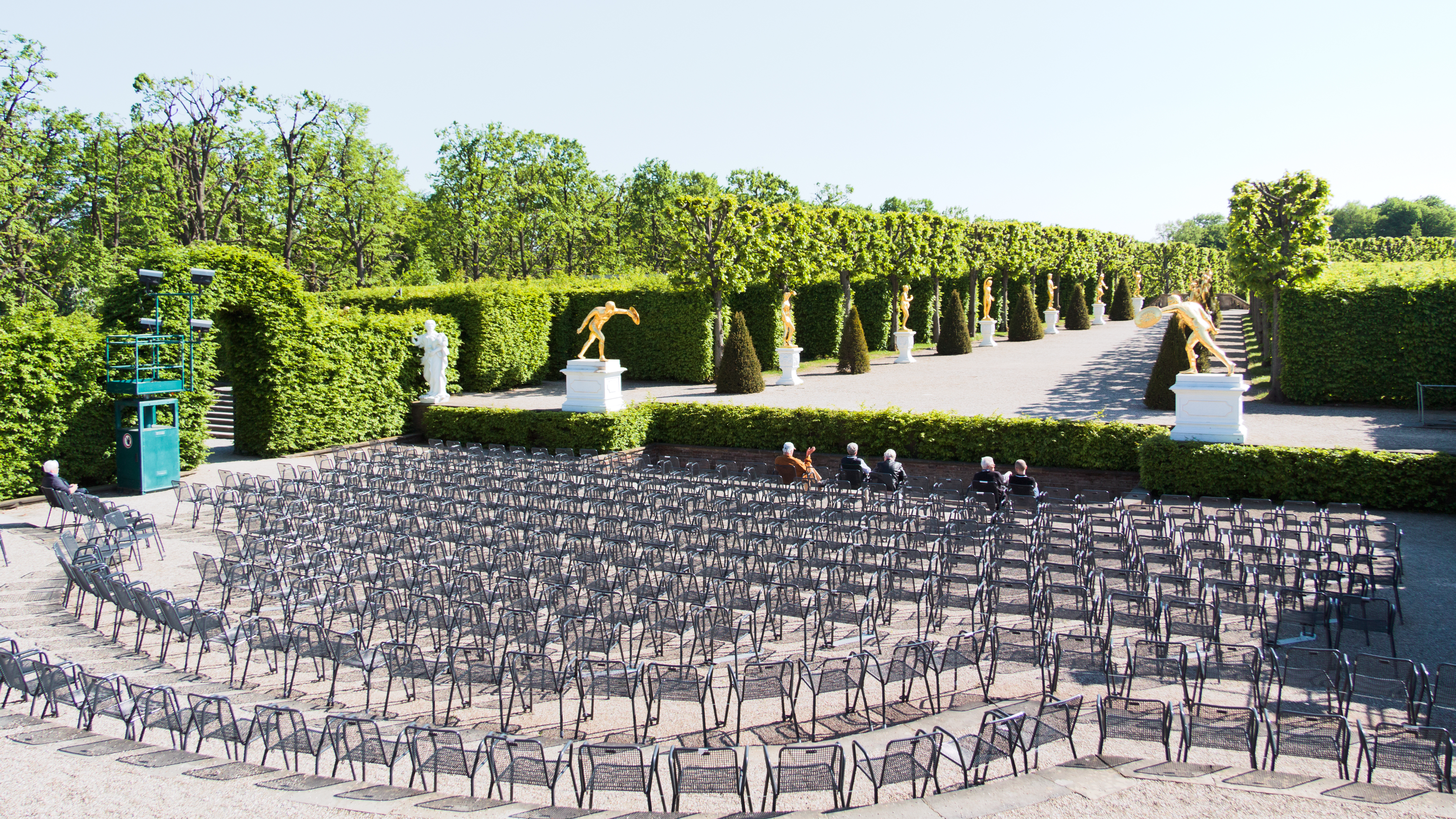 Hannover, Herrenhausen, Großer Garten, Gartentheater: Zuschauerraum und Bühne.